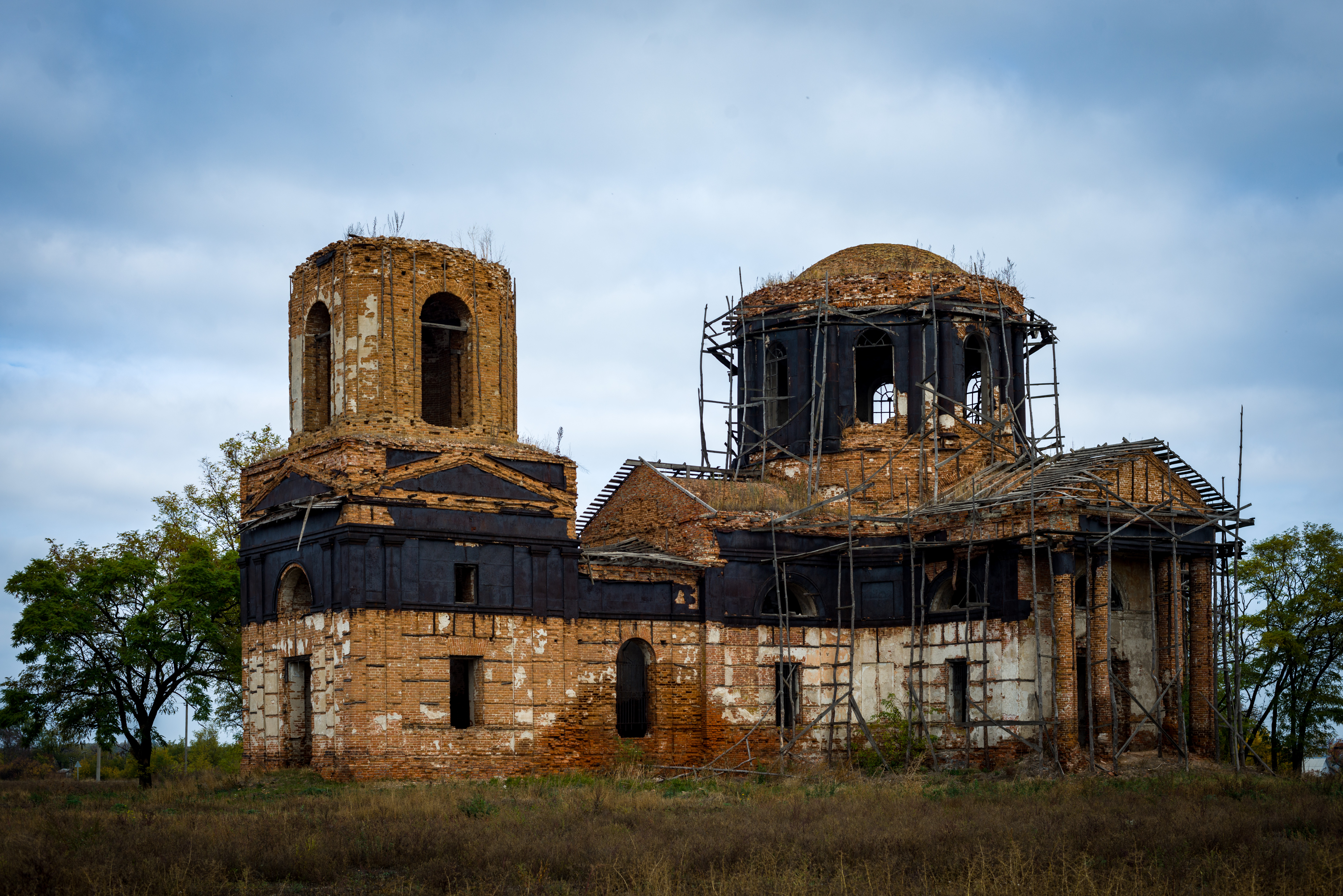 Благовіщенська церква (мур.), с.Федорівка